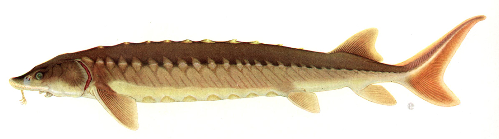 Shortnose Sturgeon (Acipenser brevirostrum)